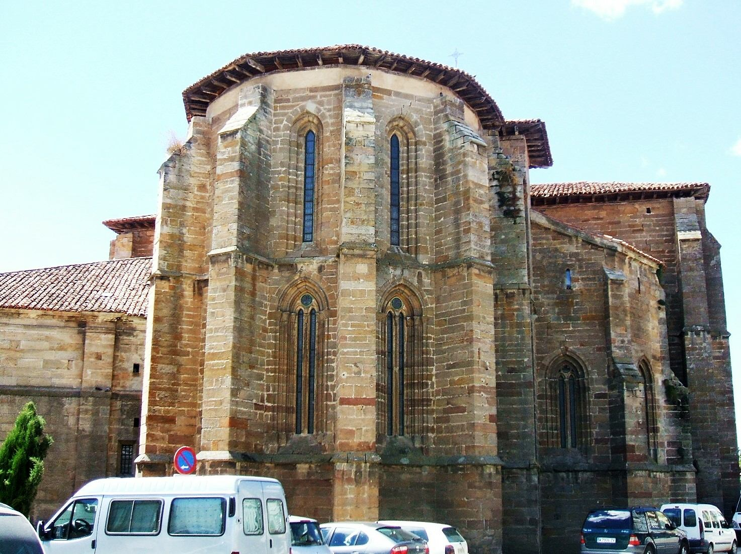 Ábside de la Colegiata de San Miguel Arcángel de Aguilar de Campoo, Palencia, Castilla y León, España